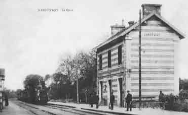 Carte Postale portant l'inscription : Landévant - Gare. L'ancienne gare de Landévant présentant le bâtiment voyageur de 1862 avec une locomotive et des personnages sur les quais